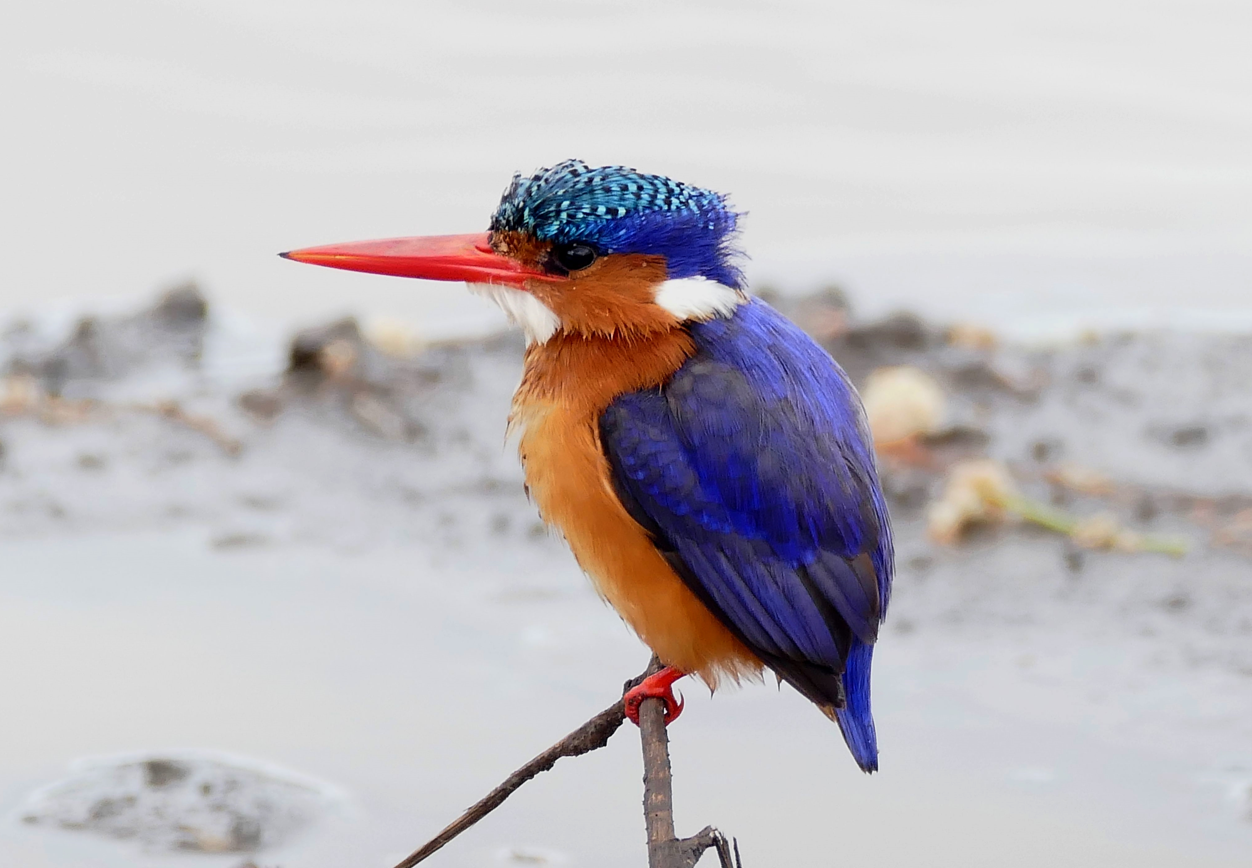 Hluhluwe-iMfolozi Park, Kwazulu-Natal, SOUTH AFRICA